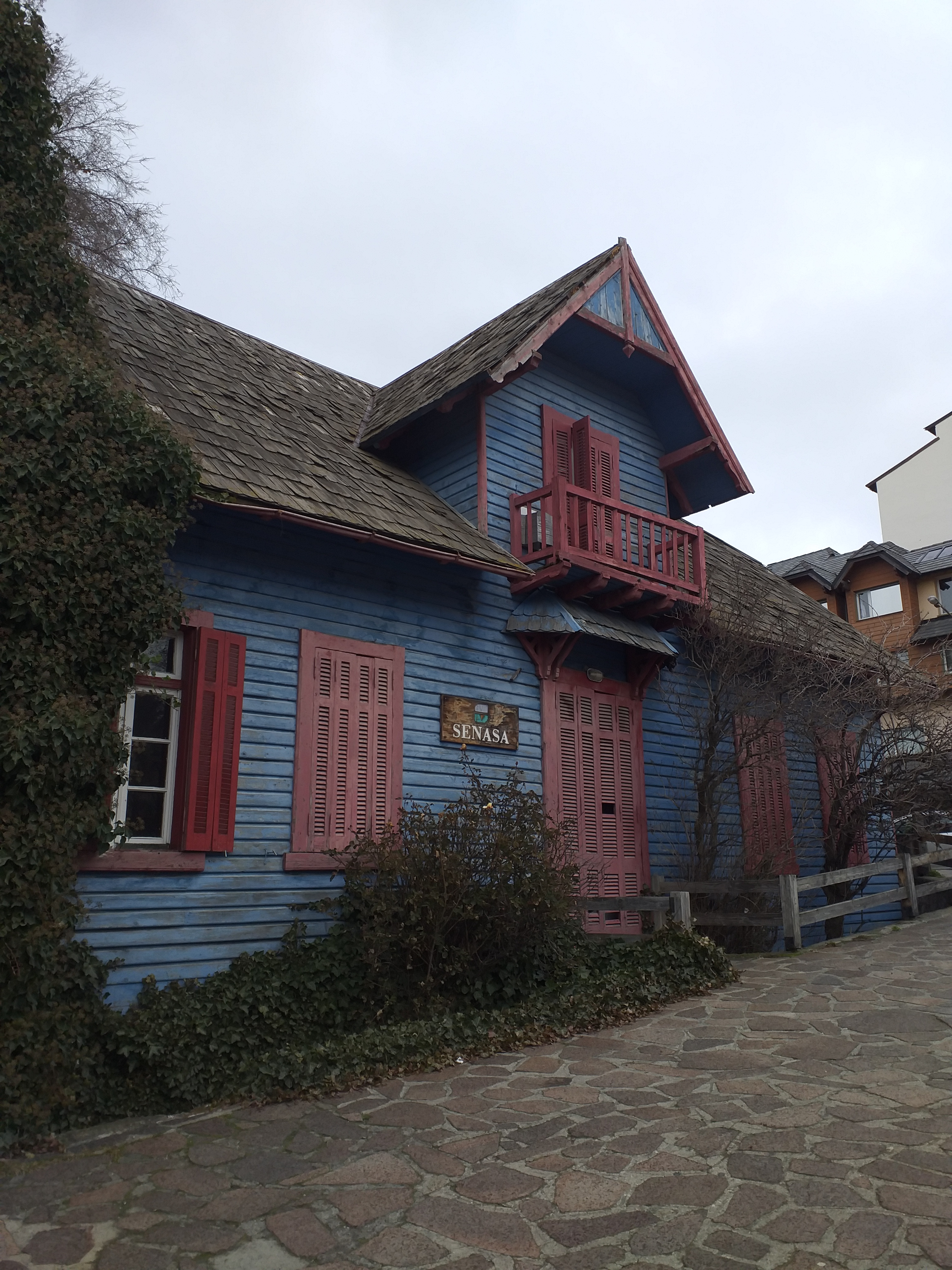 Casa de madera en Elflein y Morales